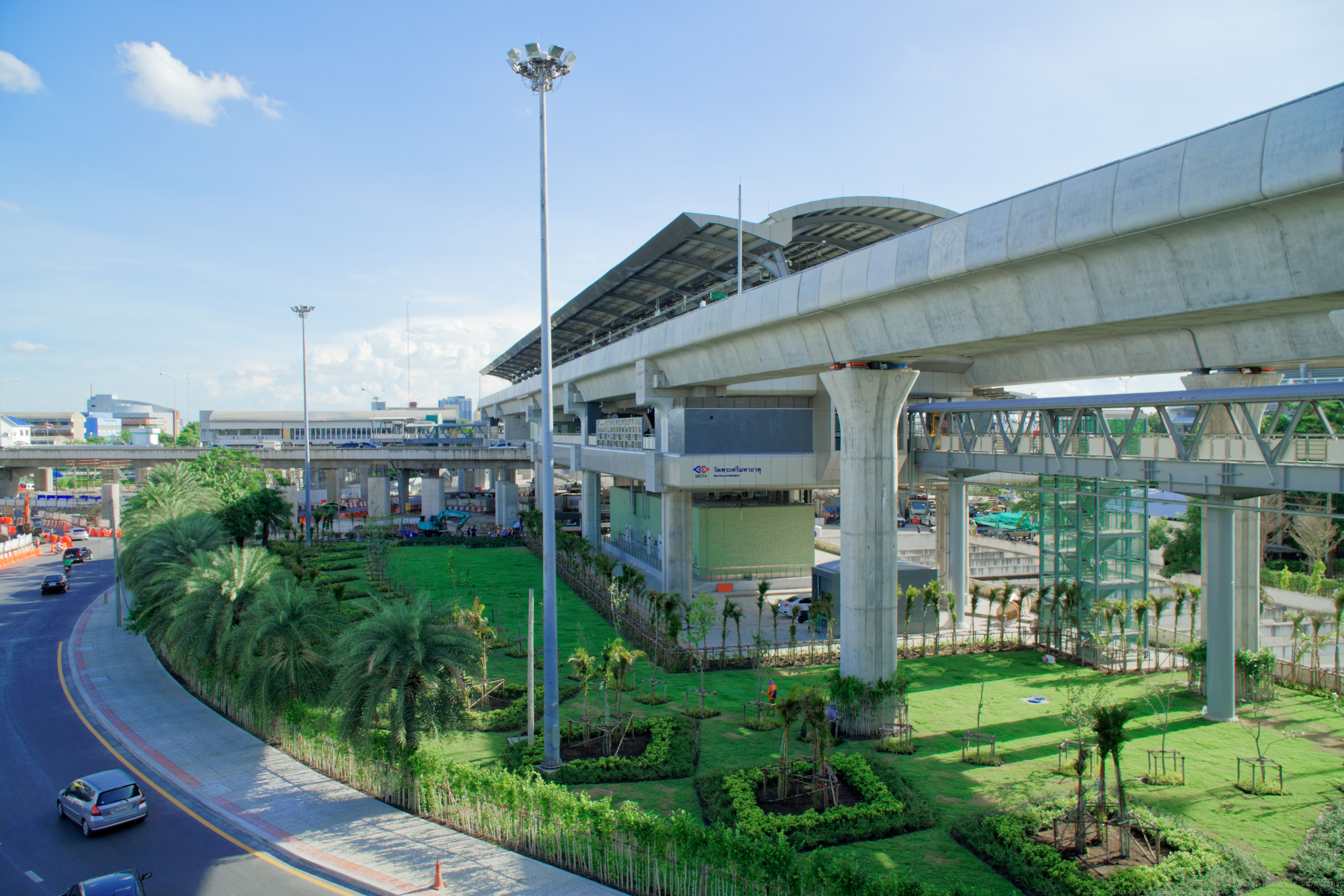 อาคารสถานีอนุสาวรีย์พิทักษ์รัฐธรรมนูญ และสวนหย่อมด้านทิศเหนือ มองจากทางออกสถานีตำรวจฯ